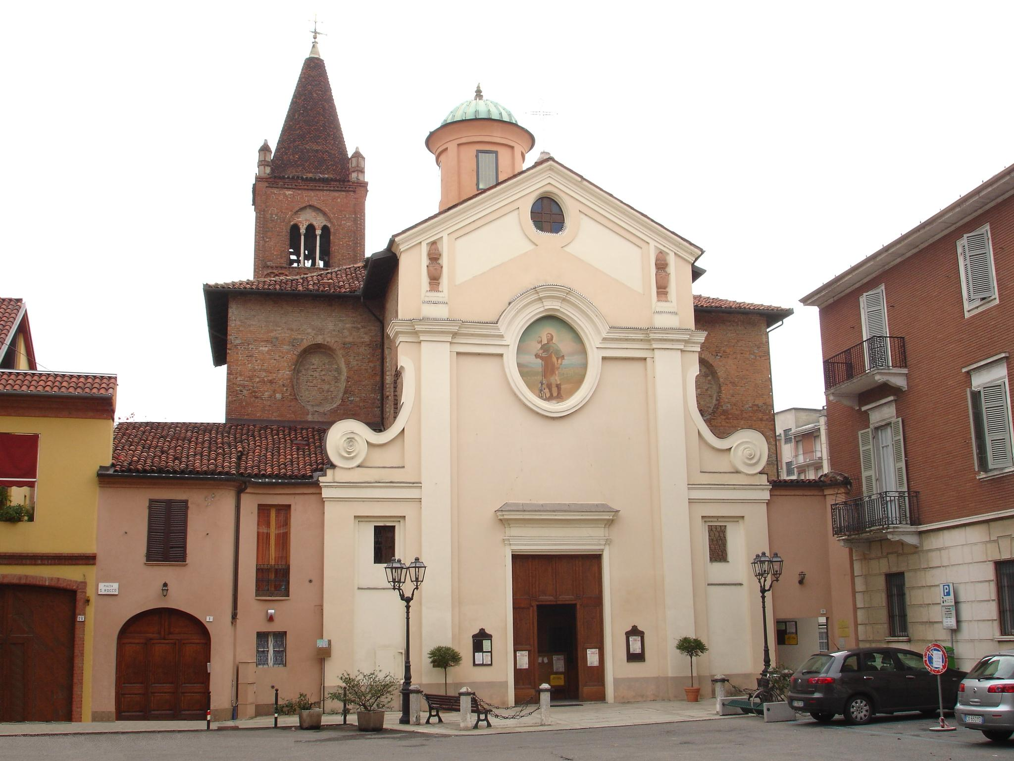 Alessandria (Italia) - Chiesa dei Santi Barnaba e Rocco - piazza San Rocco